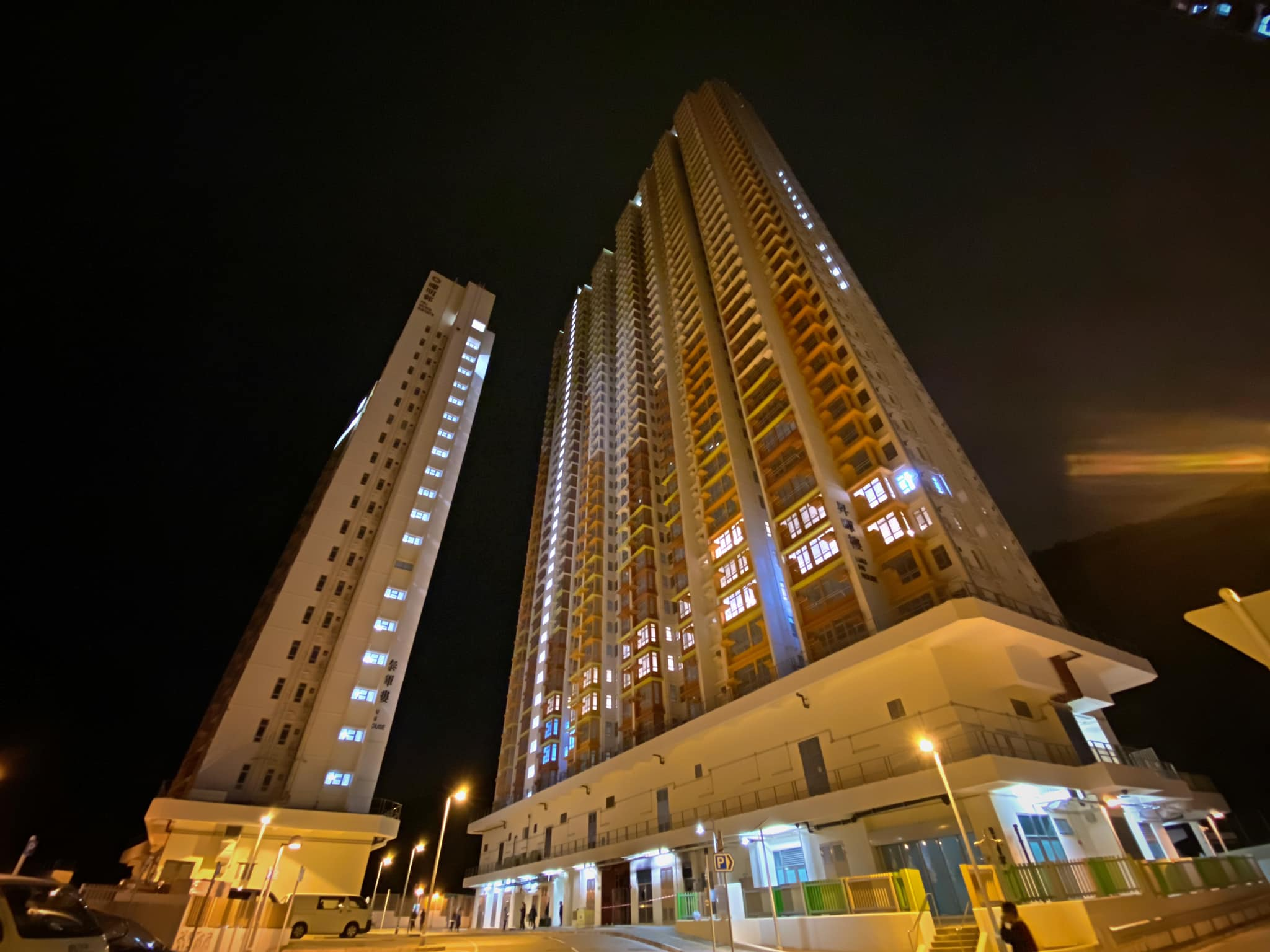 粉嶺有人不滿政府擬將未入伙的暉明邨用作隔離新型冠狀病毒患者的密切接觸者，下午起在附近一帶堵路，晚上更有人在暉明邨兩座大廈縱火，大批防暴警察到場驅趕。政府表示 ，在周三北區區議會進行討論前，將暫停相關準備工作。